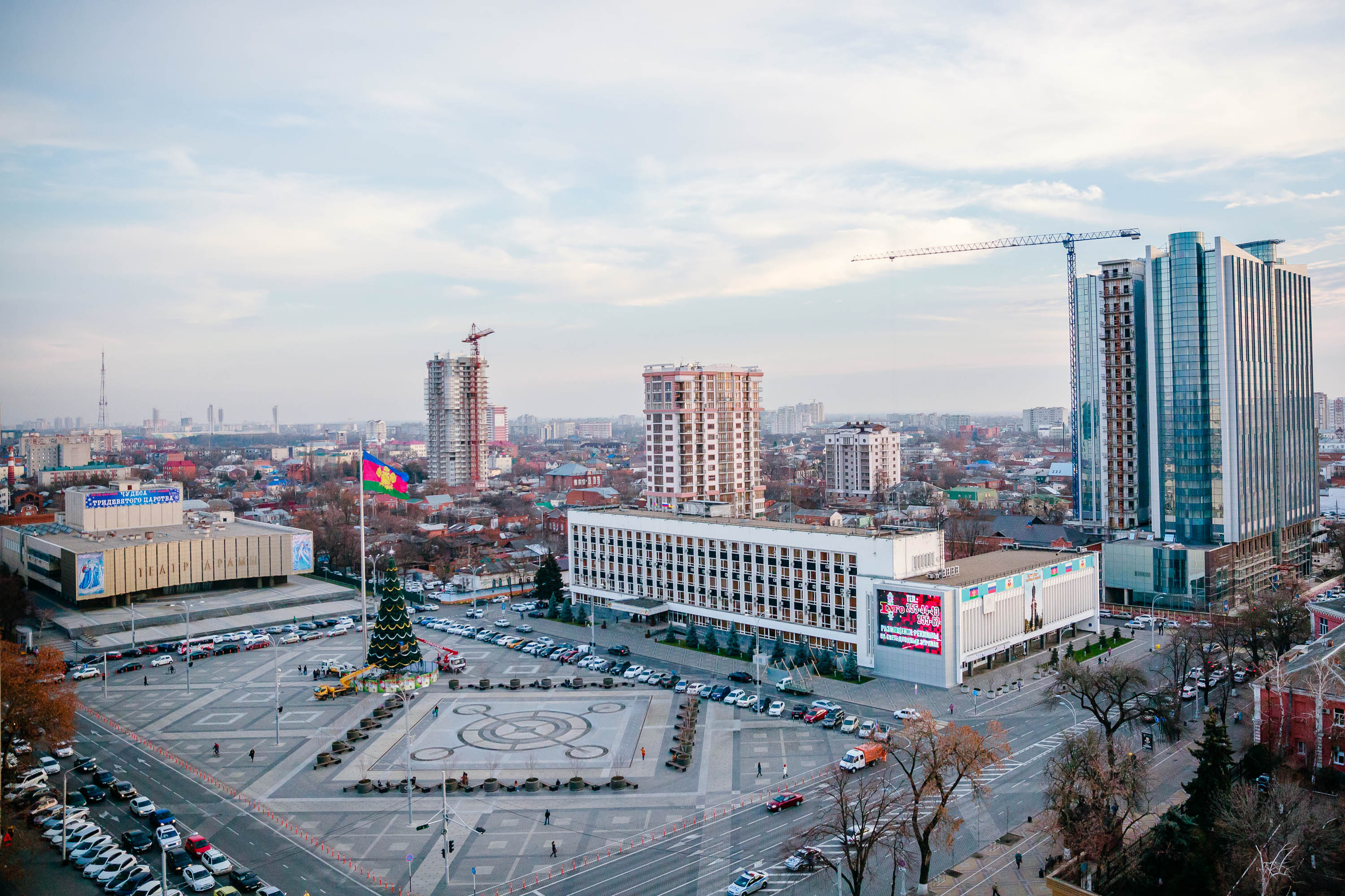 Театральная площадь